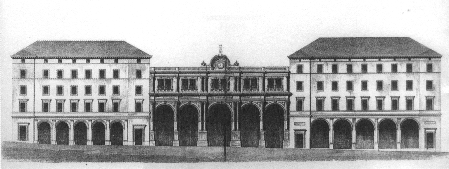 Empfangsgebäude des Stuttgarter Bahnhofs nach dem ersten Umbau.